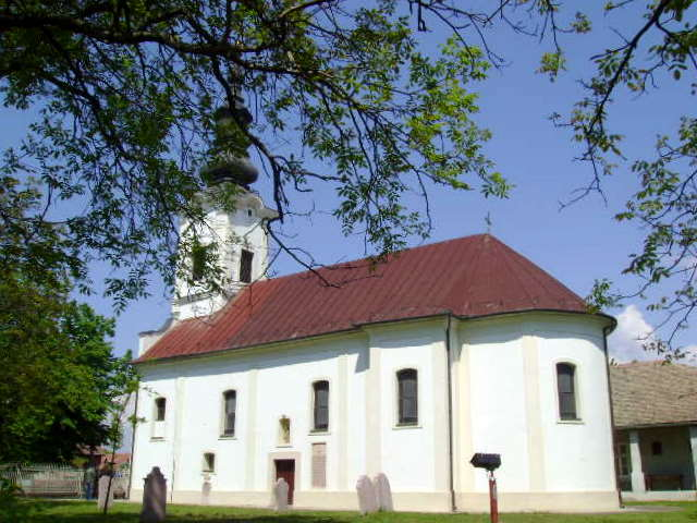 Православна црква Светог Глигорија Богослова